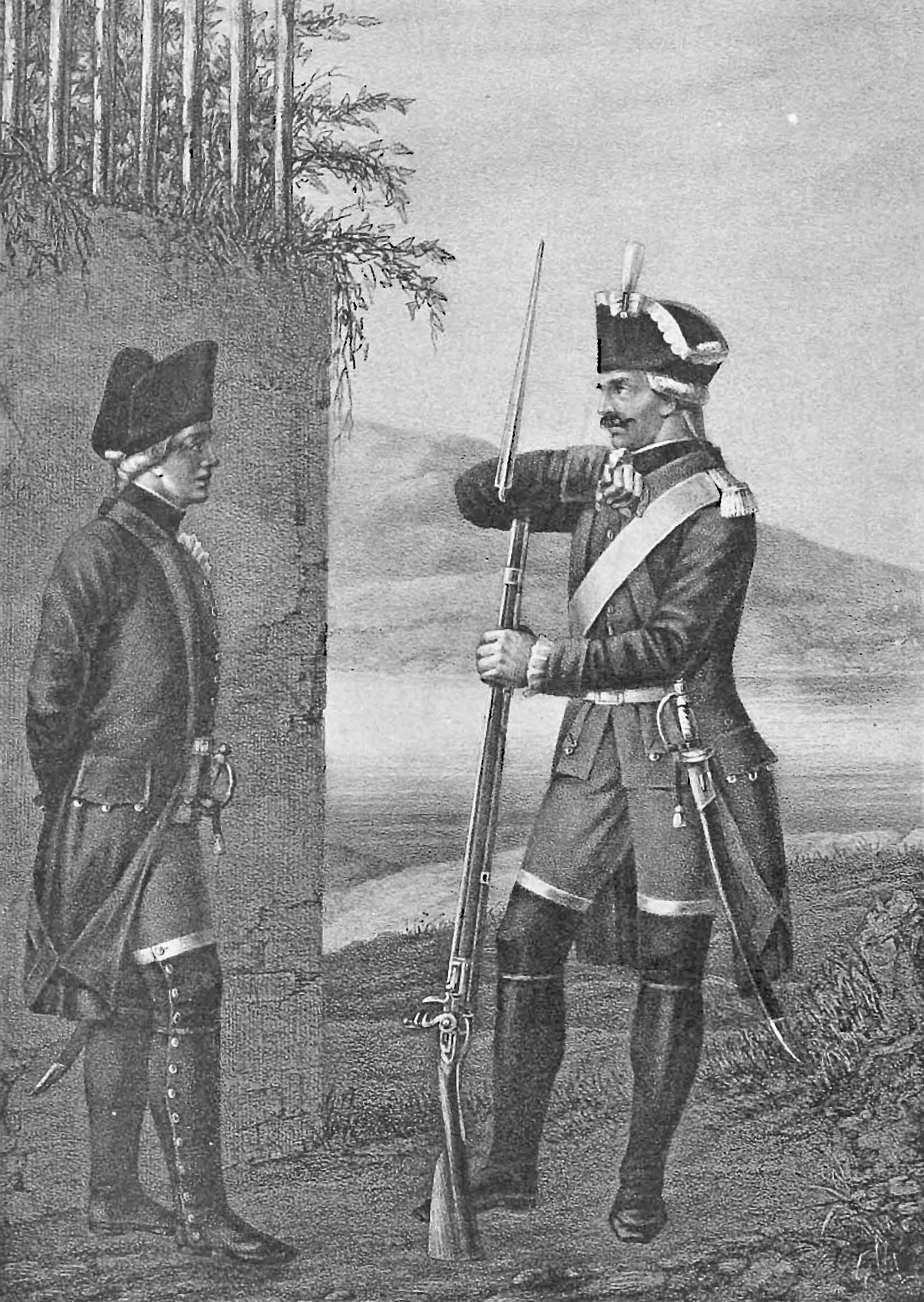 Мушкетеры: Нестроевой и Рядовой Легких Полевых Команд, с 1771 по 1775 год.